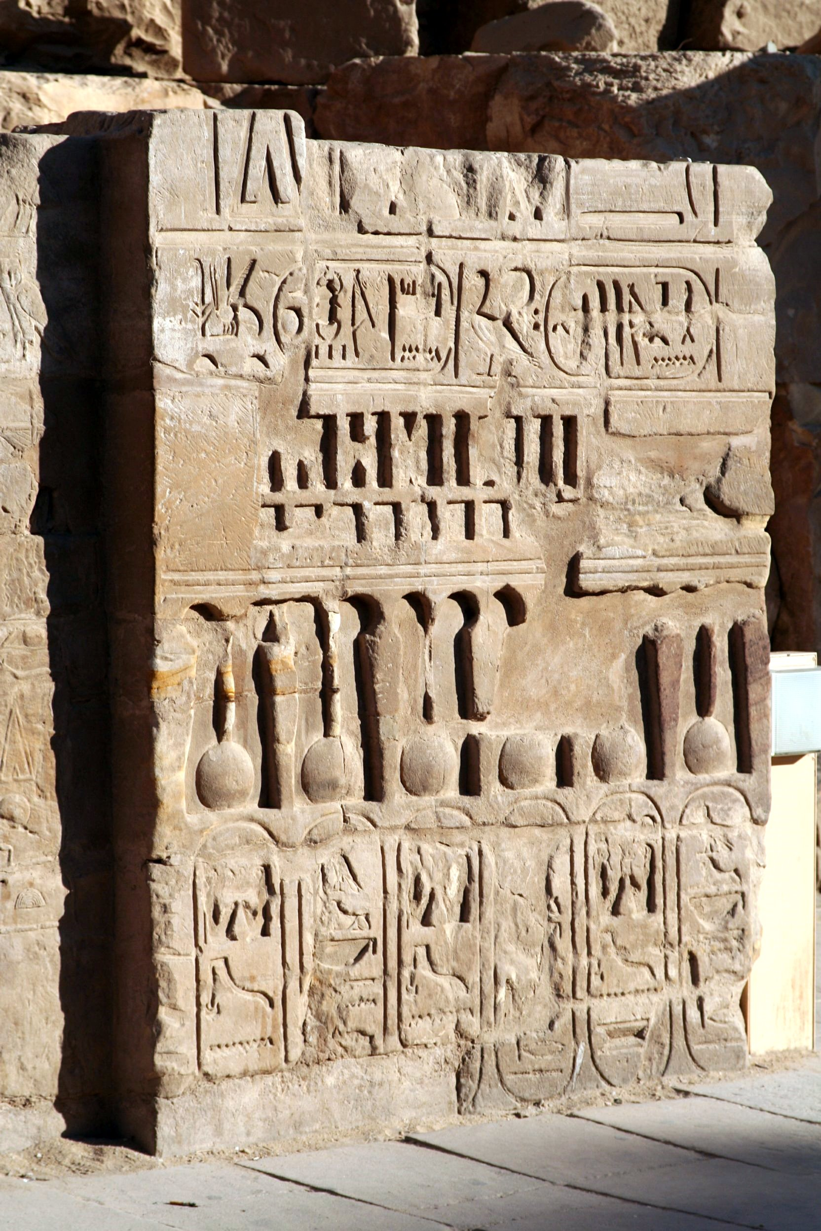 Karnak Temple at Luxor